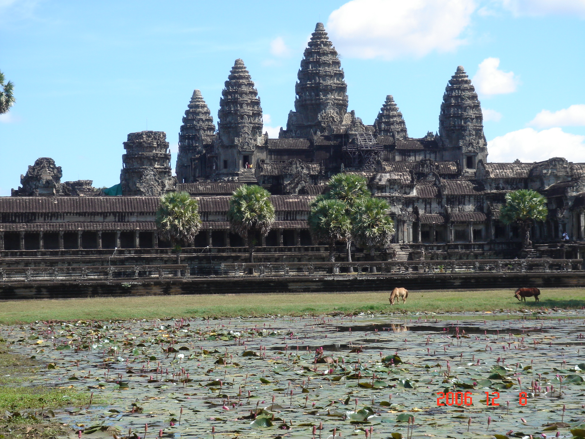 Toàn cảnh Angkor wat